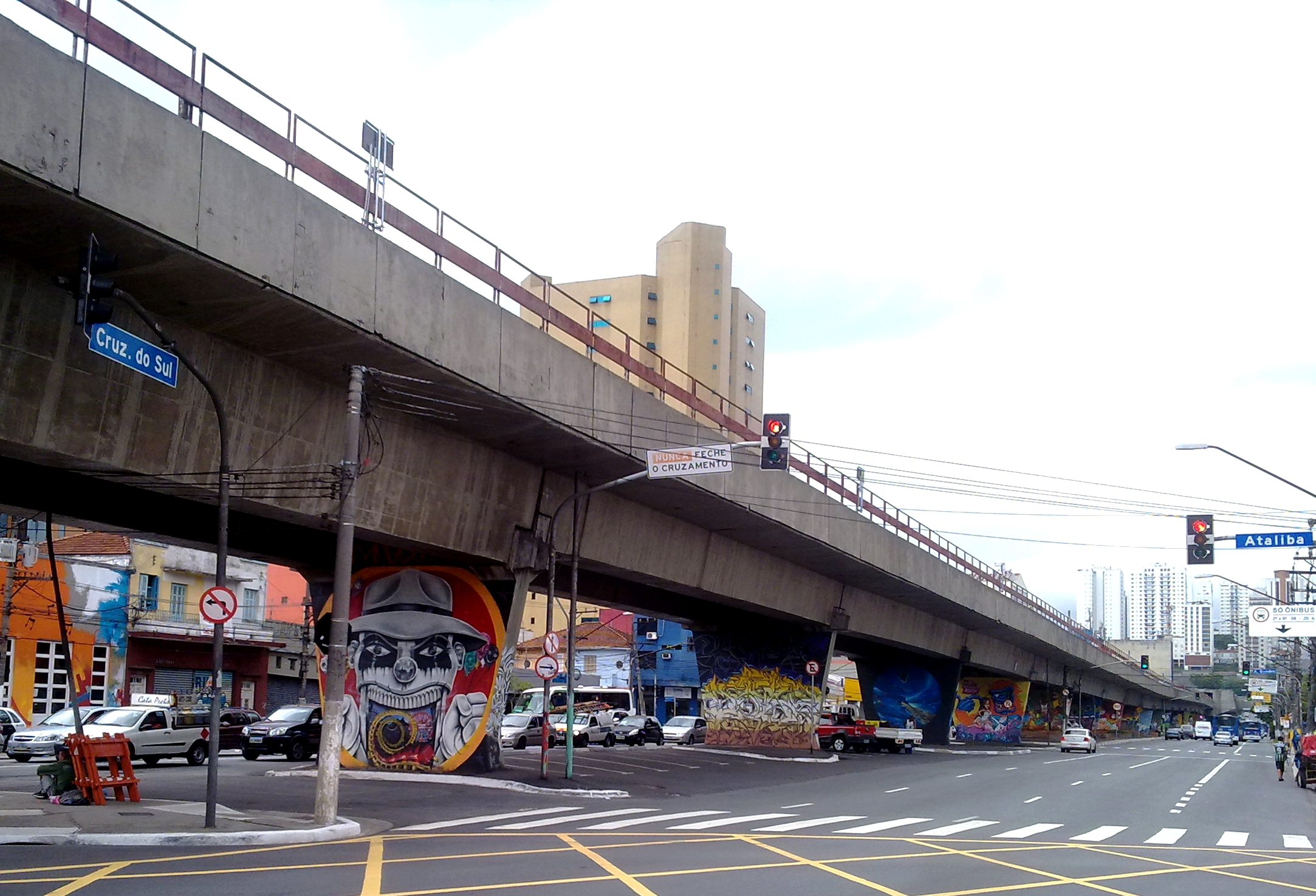 Museu Aberto de Arte Urbana de São Paulo, Santana, Zona Norte de São Paulo, Brasil.